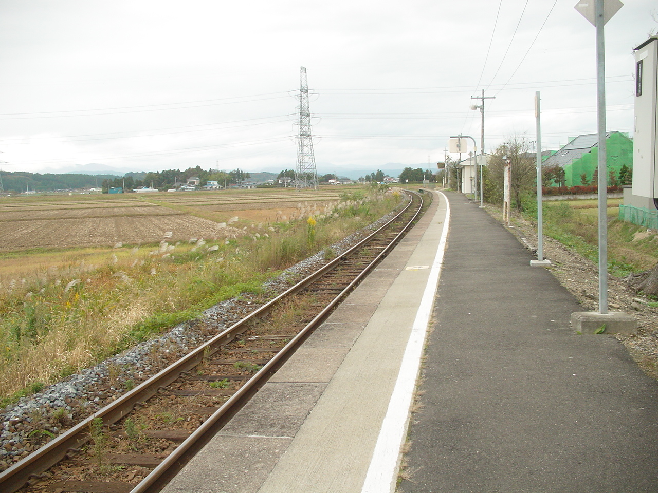 （西大崎駅）